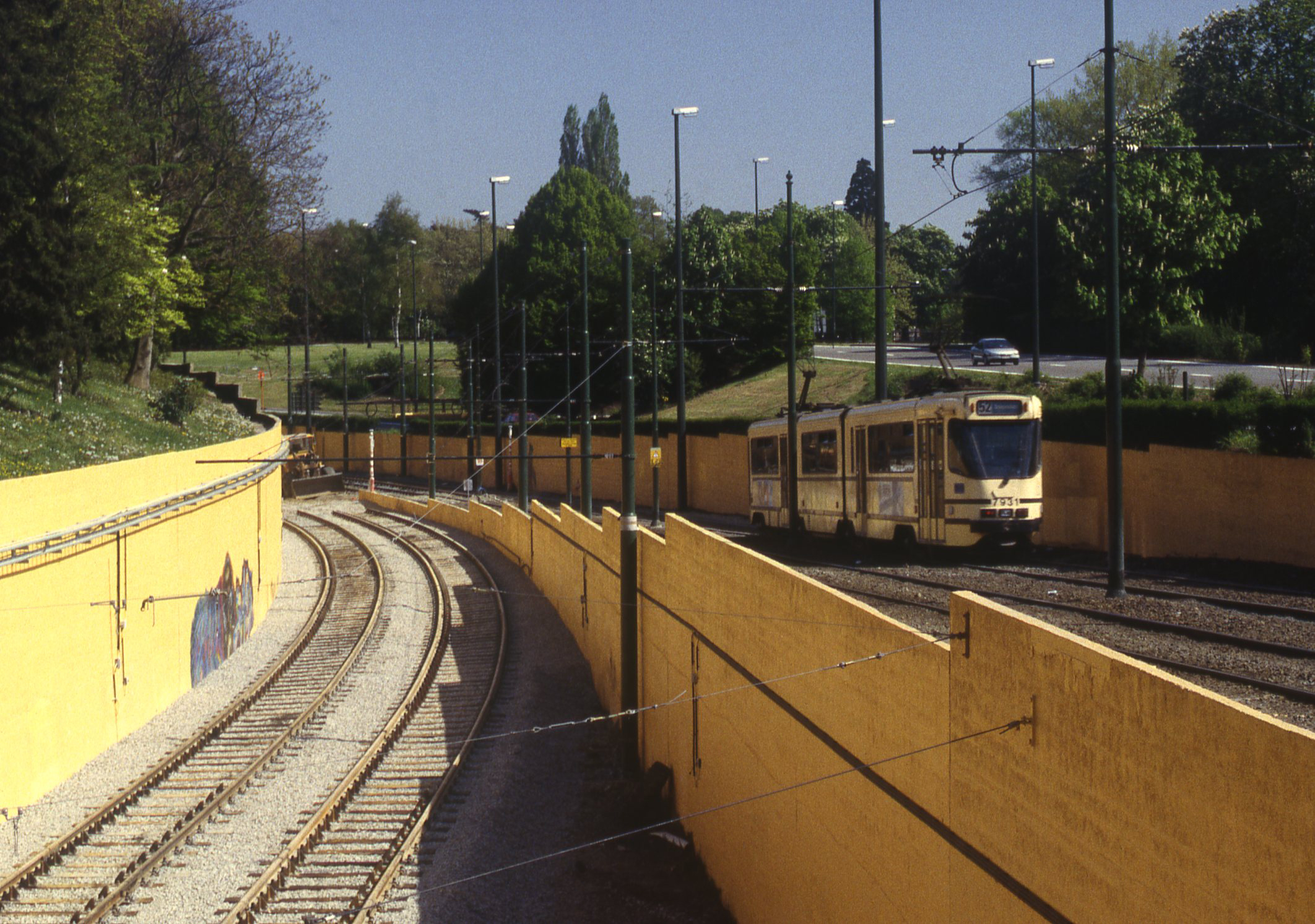 De aanleg van normaalspoor t.b.v. de Brusselse tram bij de voormalige buurtspoortramtunnel. Op 1 september 1994 werden deze sporen in gebruik genomen.